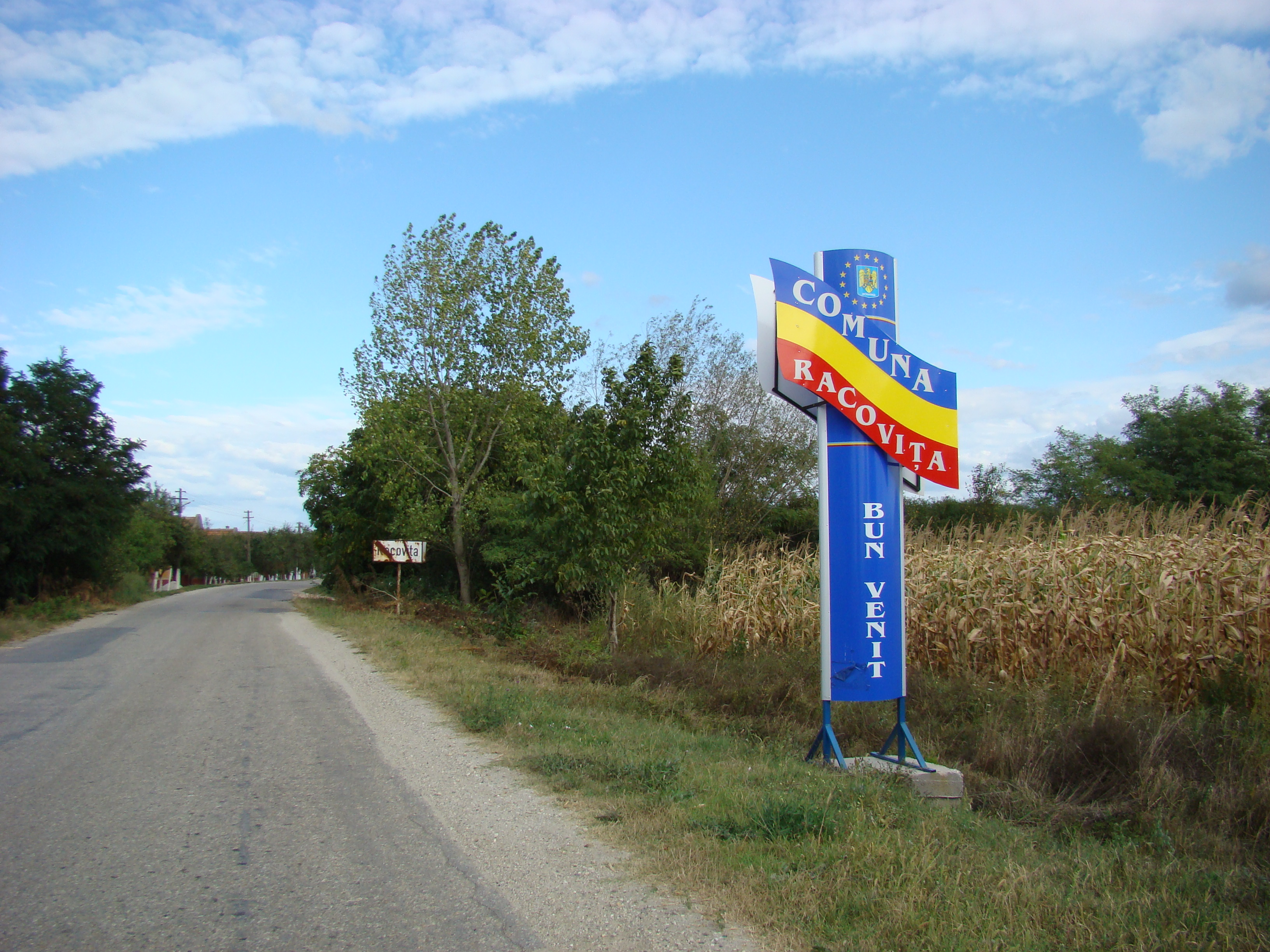 Racovița, Timiș